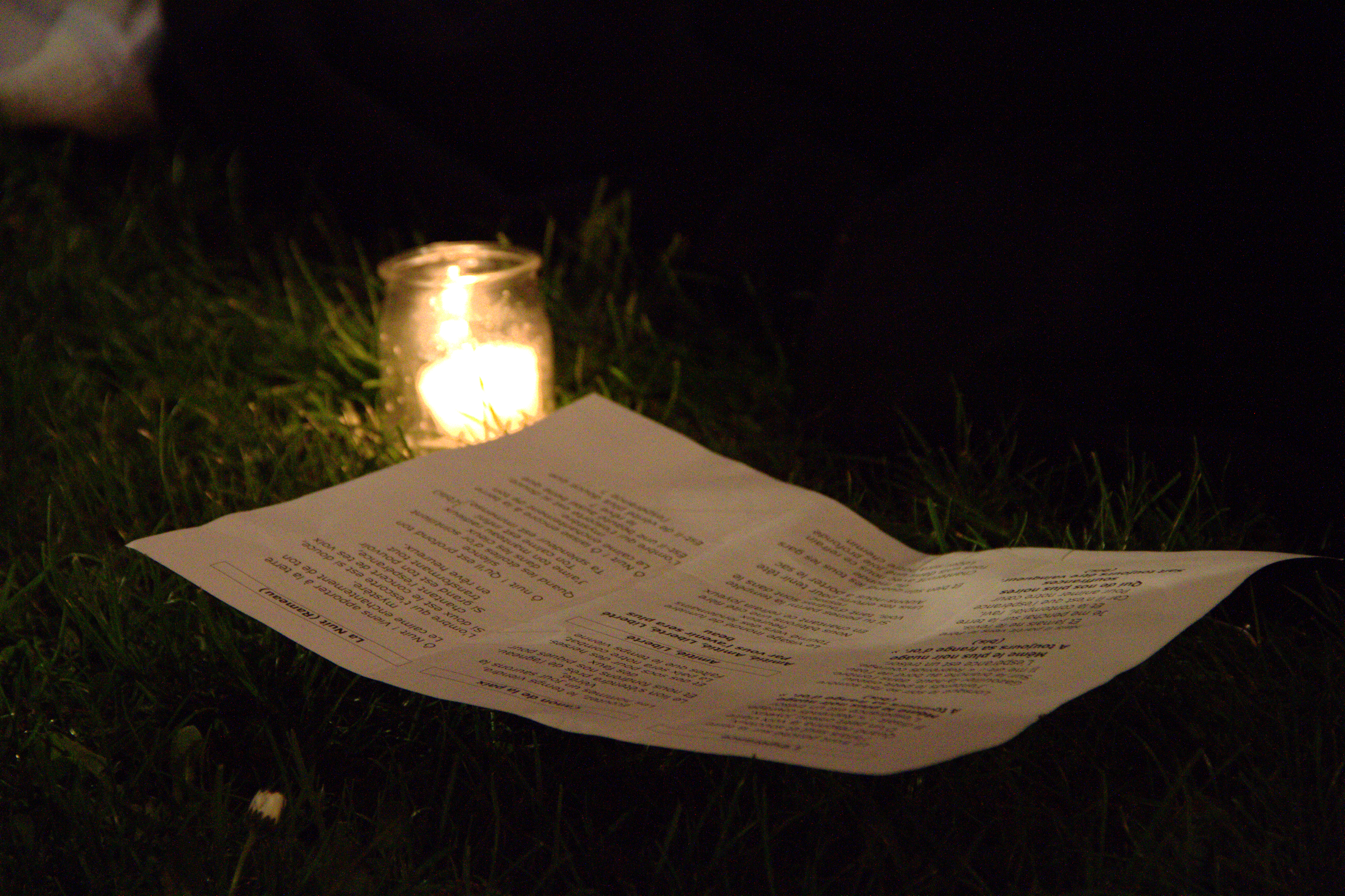 Strasbourg 25 avril 2013 les Veilleurs place de la République